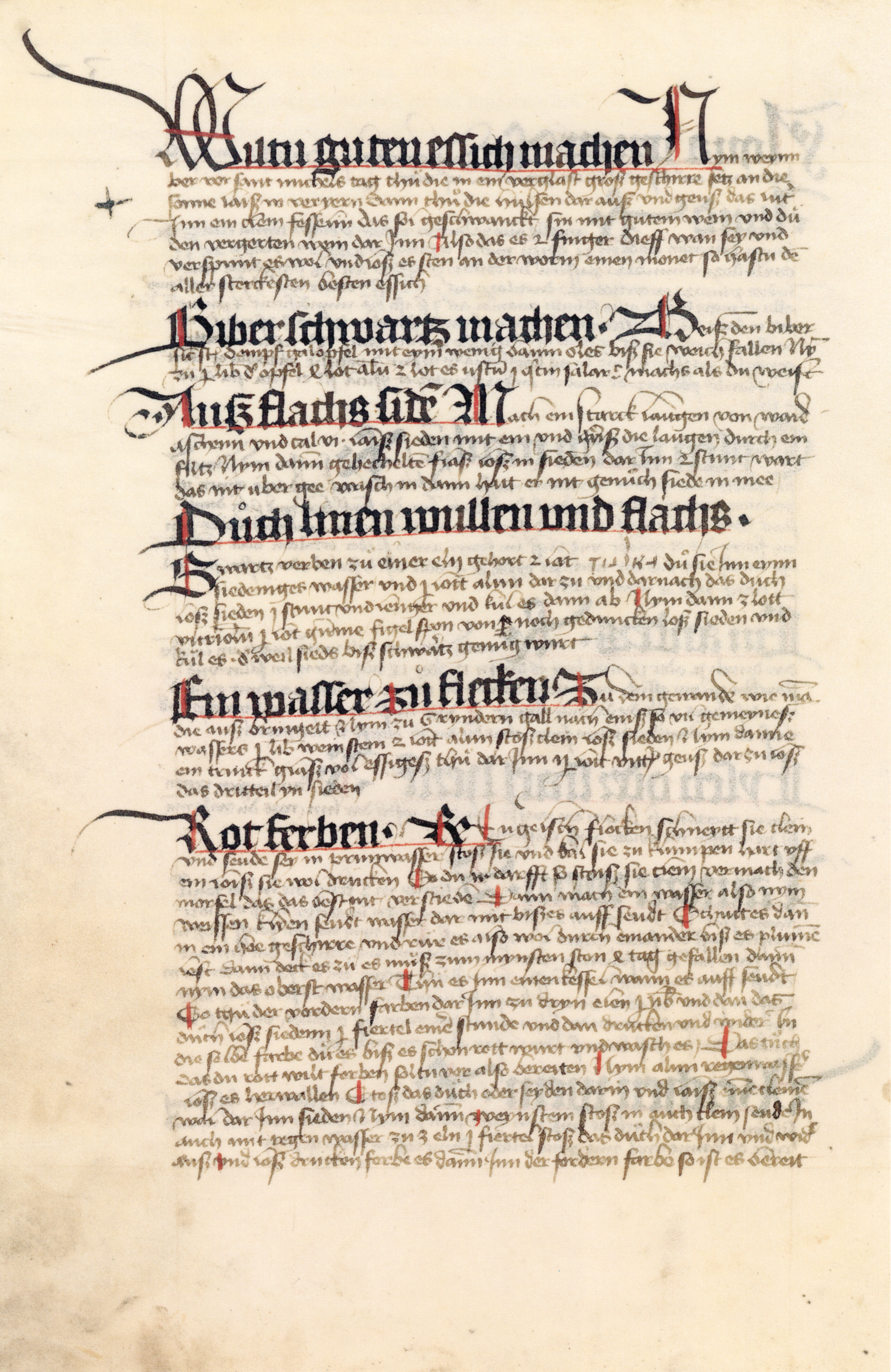 Mittelalterliches Hausbuch von Schloss Wolfegg Fol 32v: Rezeptsammlung zum Gewandfärben und zur Fleckenreinigung